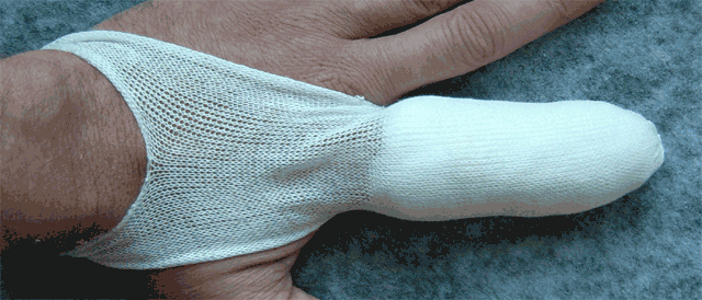 Darstellung der Anwendung eines Schlauchverbandes als Fingerverband